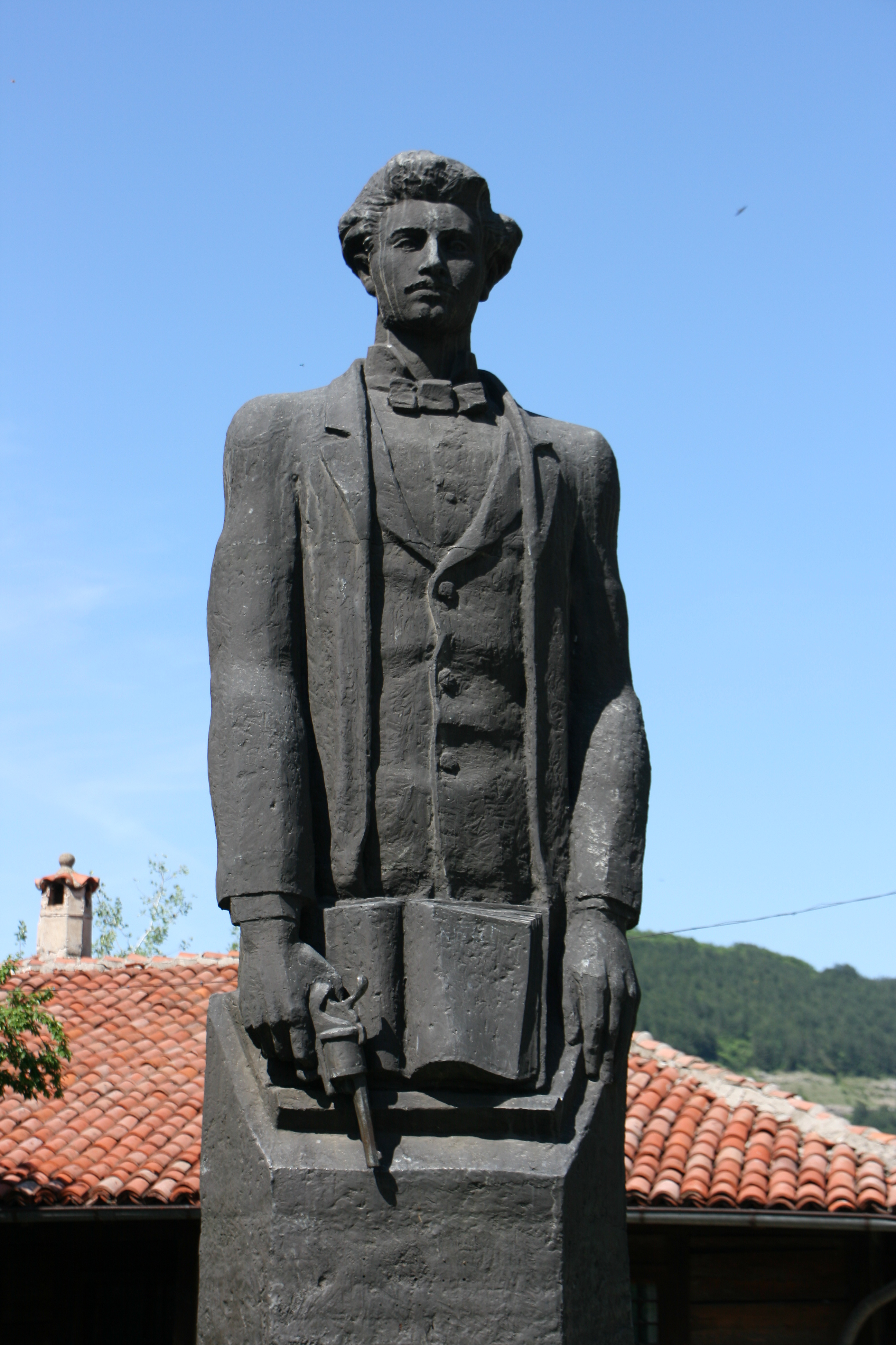 Todor Lefterov (1852 - 1876)